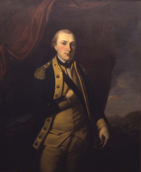 Gilbert du Motier de La Fayette, en uniforme de l'armée continentale.